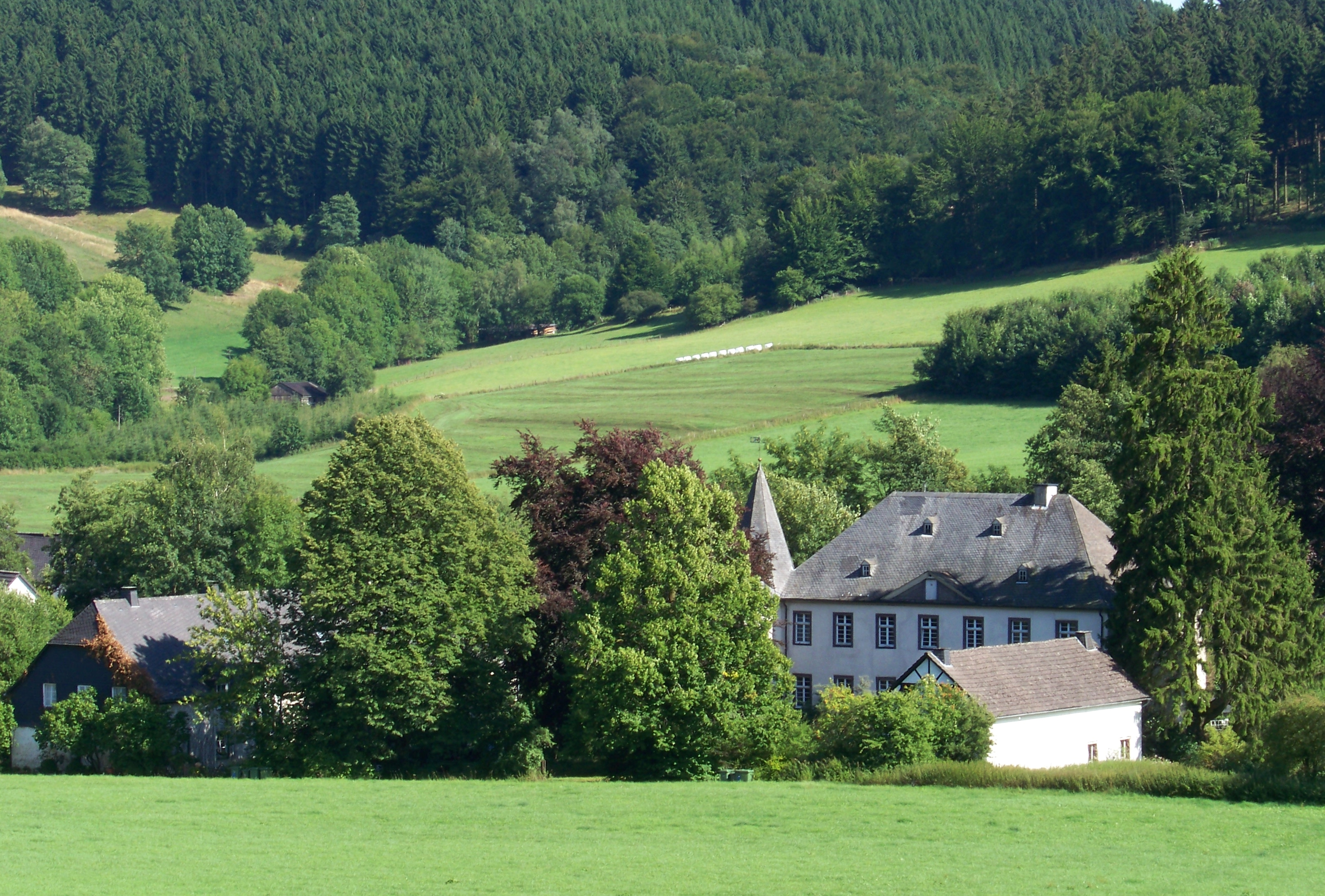 Schloss Obersalwey, Eslohe (Germany)